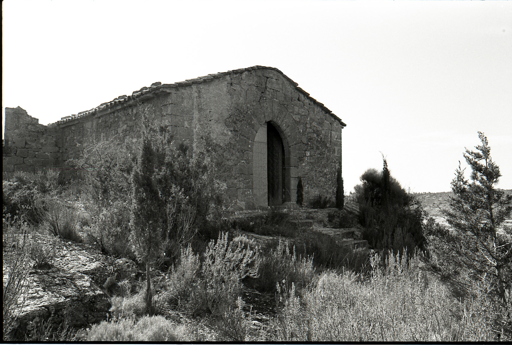 Vista exterior de l'església de Sant Joan d'Algars (Terra Alta), s. XIII